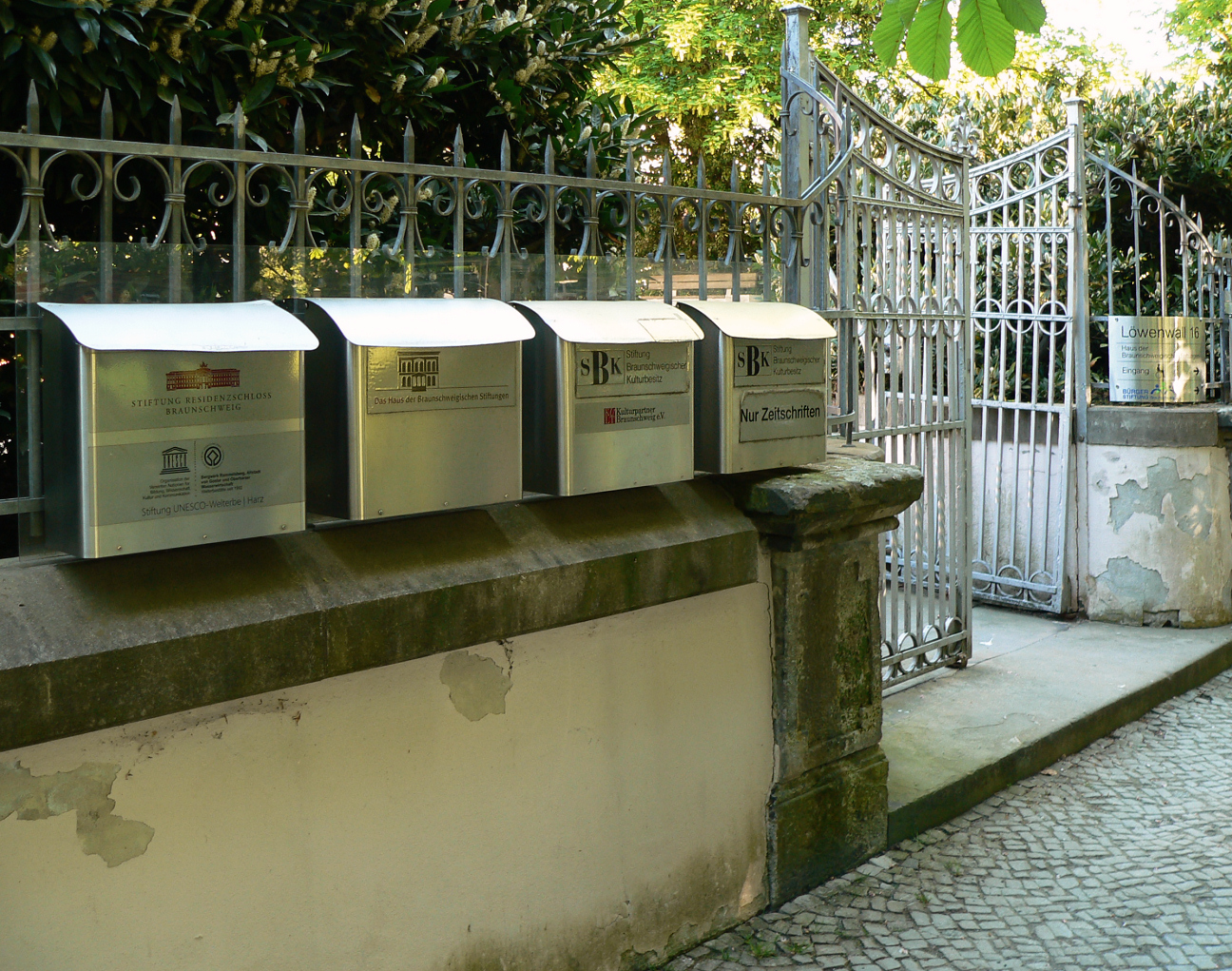 Haus der Braunschweigischen Stiftungen Briefkästen